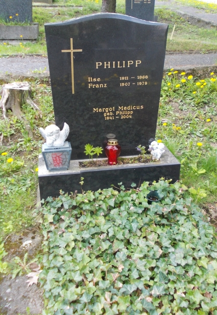 Neustifter Friedhof- Margot Philipp